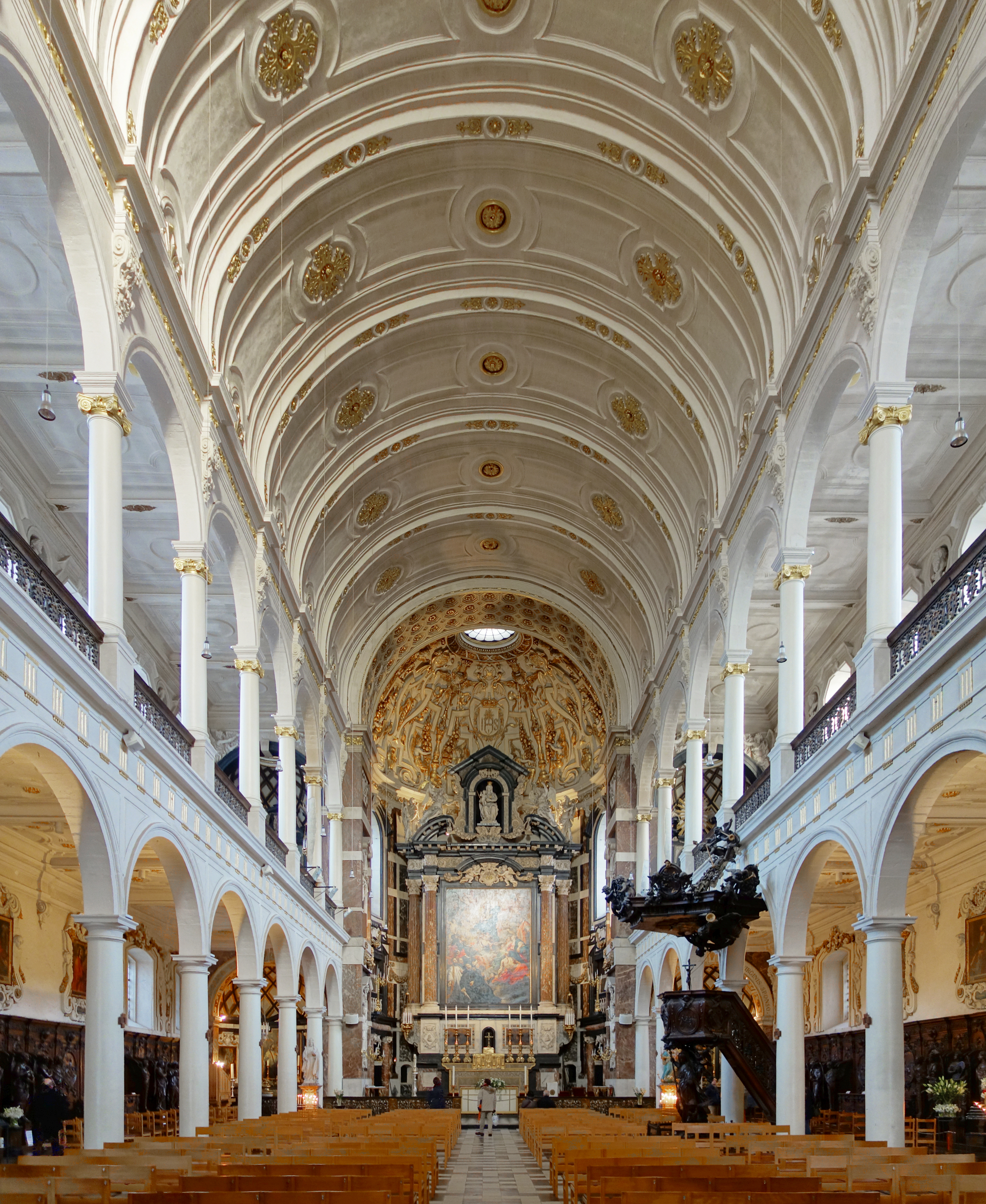 La nef de l'église Saint-Charles-Borromée d'Anvers.